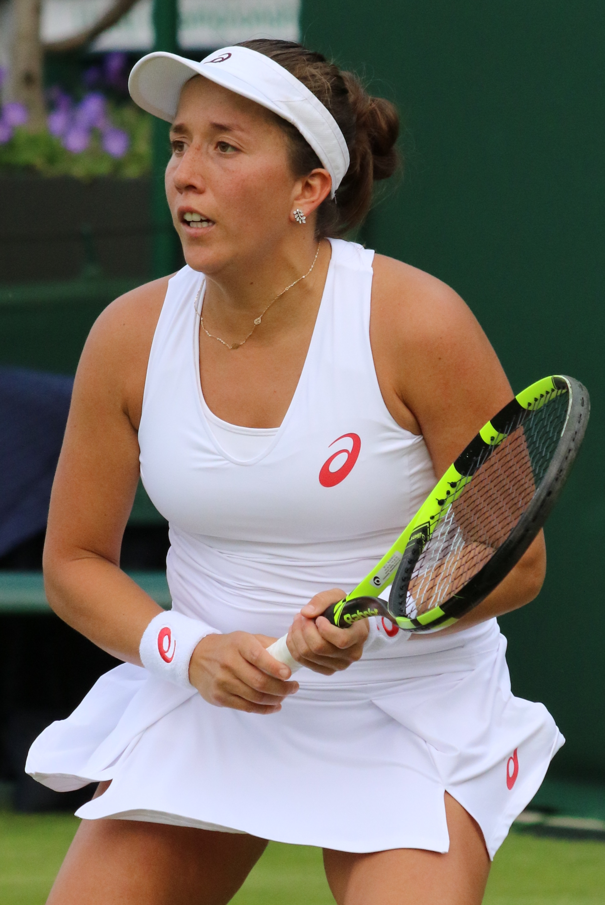 Falconi WM16 (6)